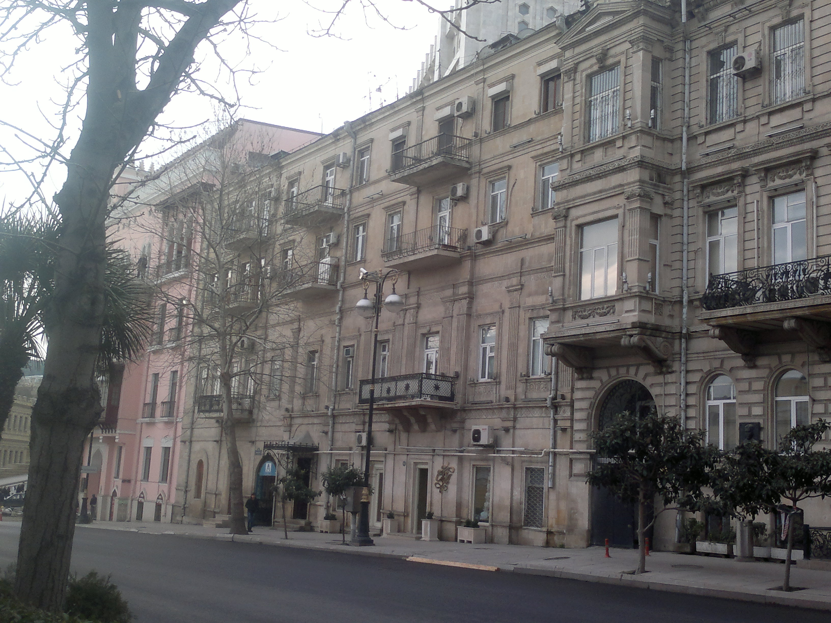 Building on Istiglaliyyat Street 23. Built in 1896 by Kazimir Skurevich.